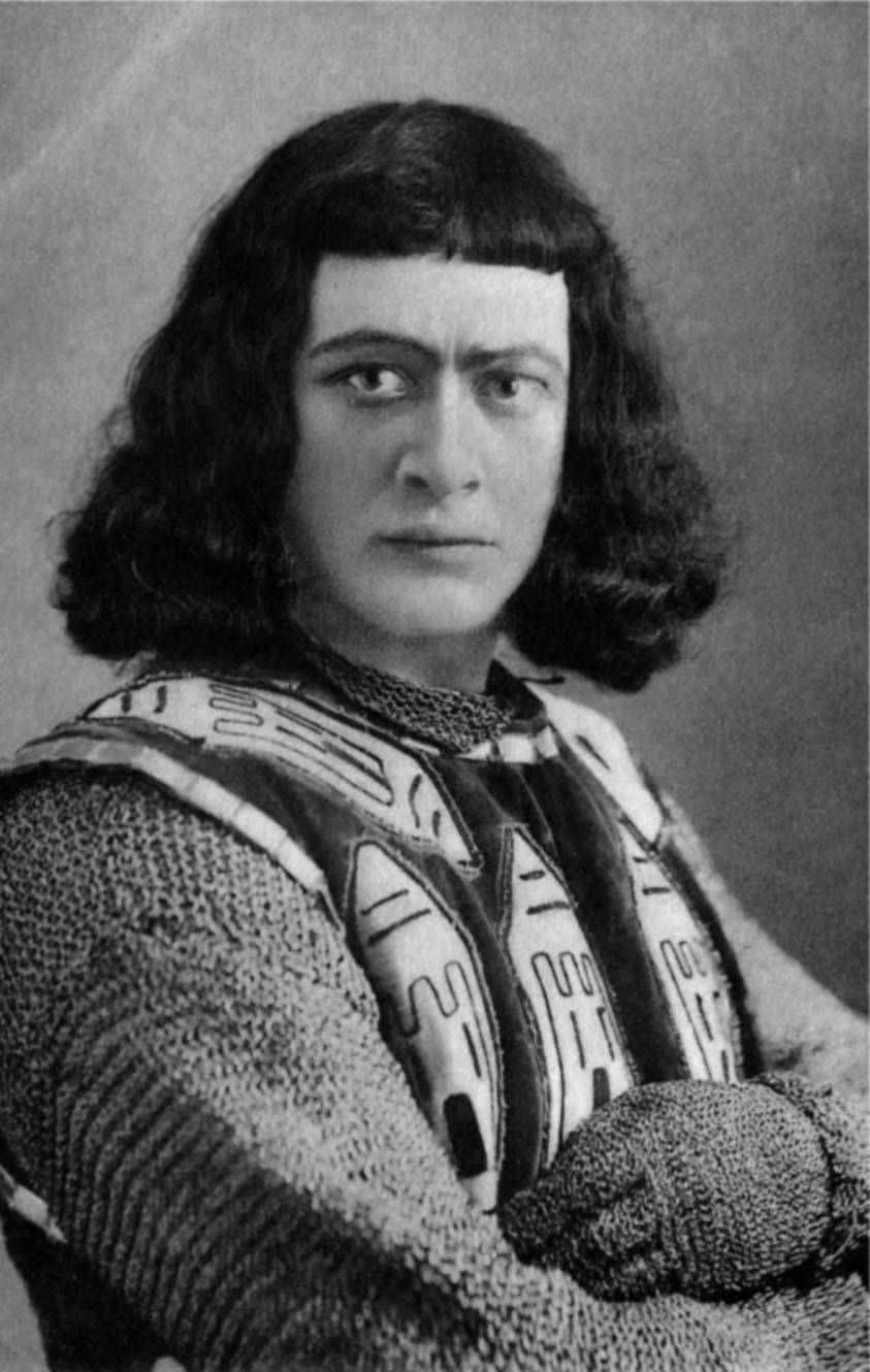 Г. А. Бакланов — Ланчотто Малатеста («Франческа да Римини» С. В. Рахманинова). Москва. Студия К. А. Фишер.